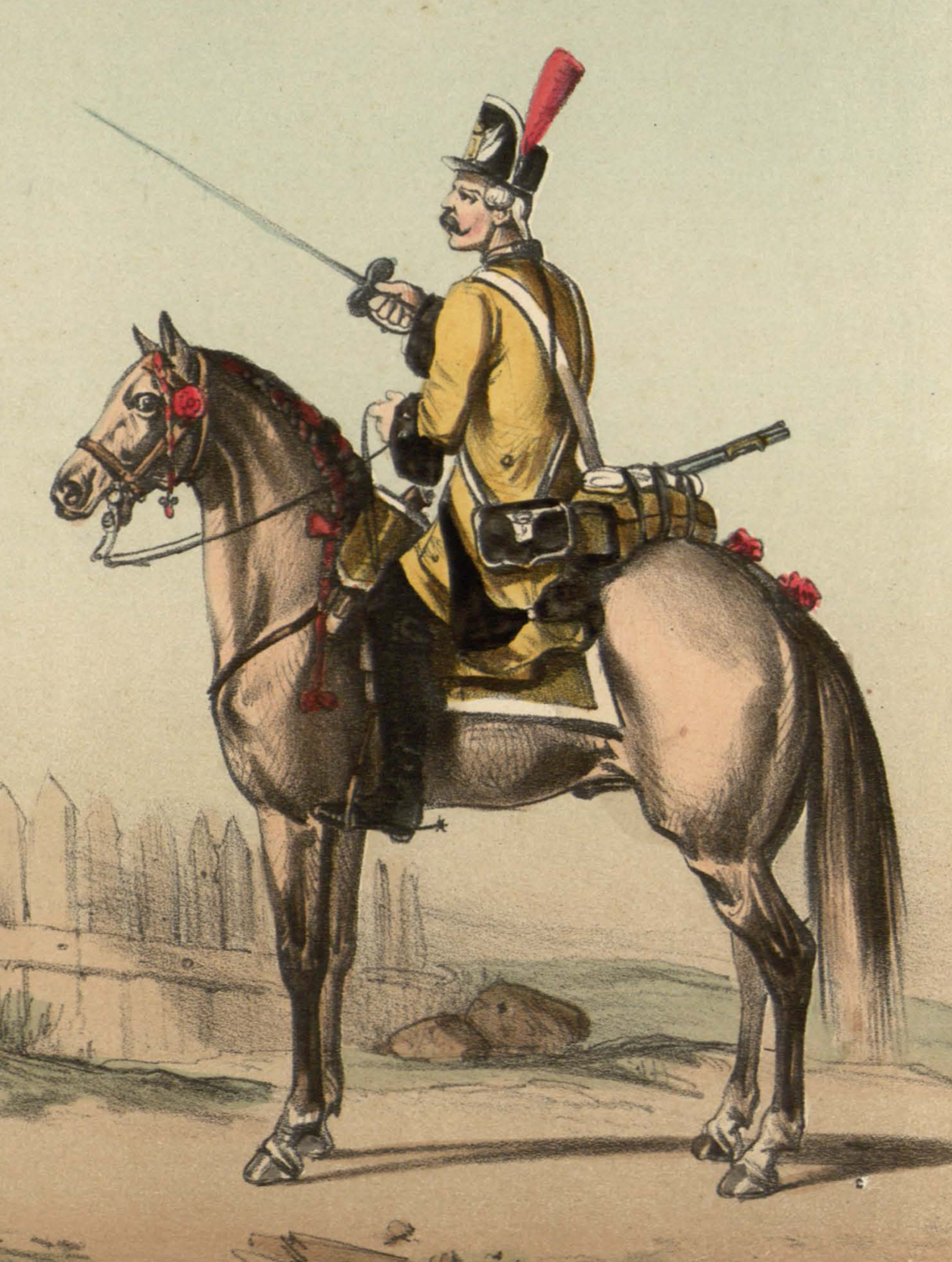 Dragón del regimiento de caballería español "Lusitania" en 1763.